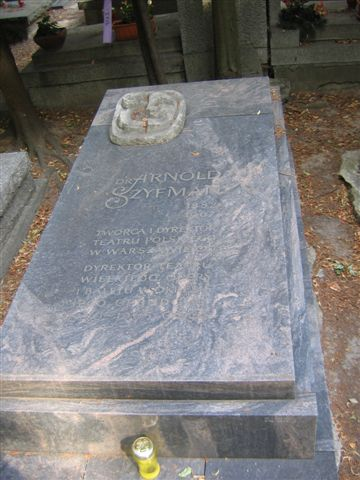 Arnold Szyfman's monument (Powązki Cemetery; Cmentarz Komunalny, d. Wojskowy)